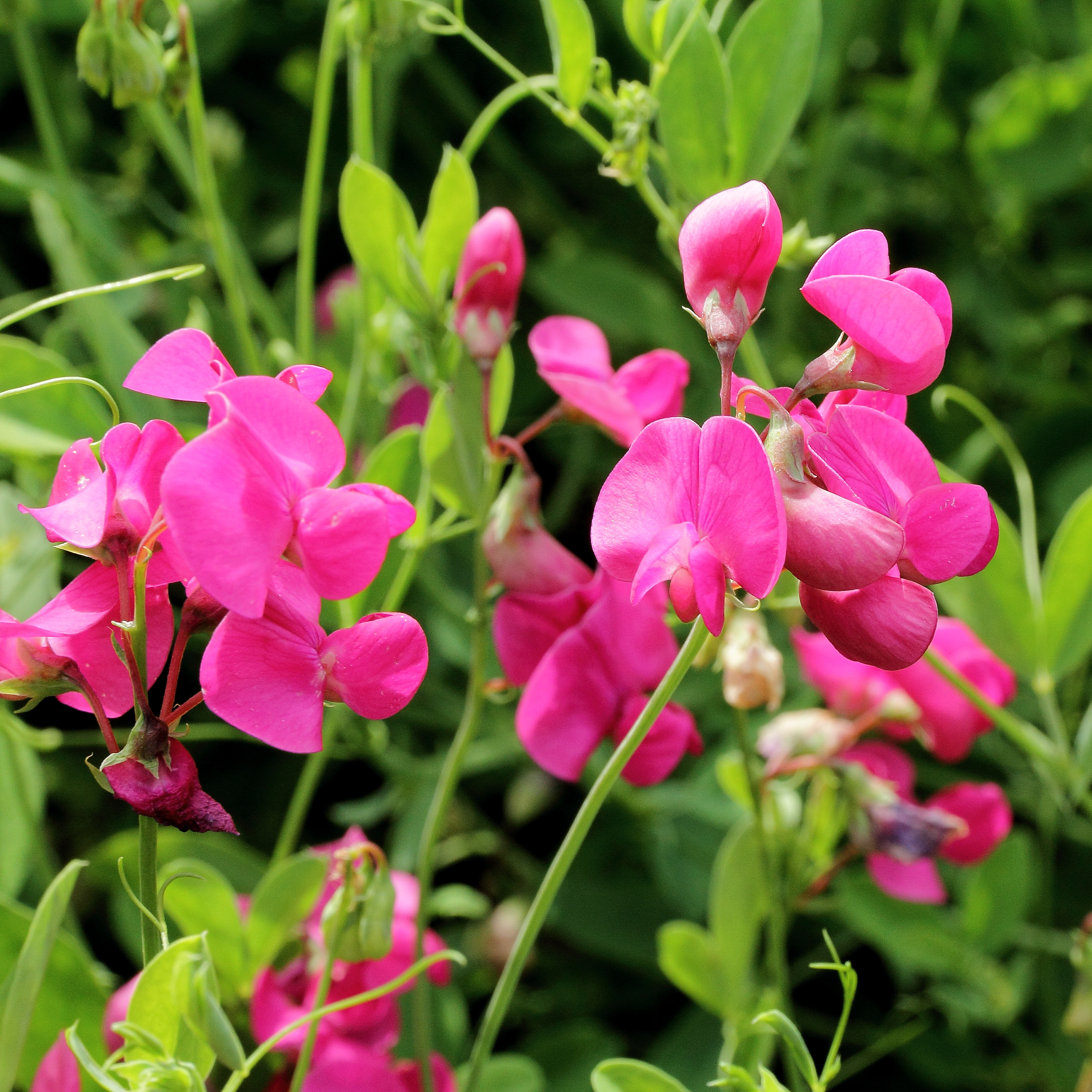 Lathyrus tuberosus i Bergianska trädgården.